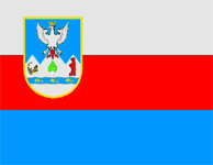 прапор Великоберезнянського району